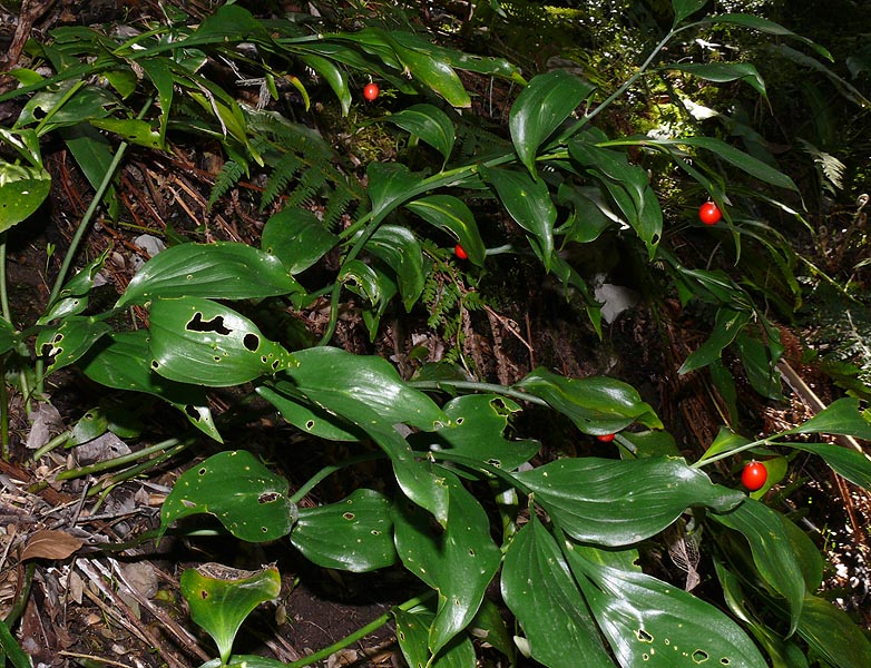 Иглица колхидская